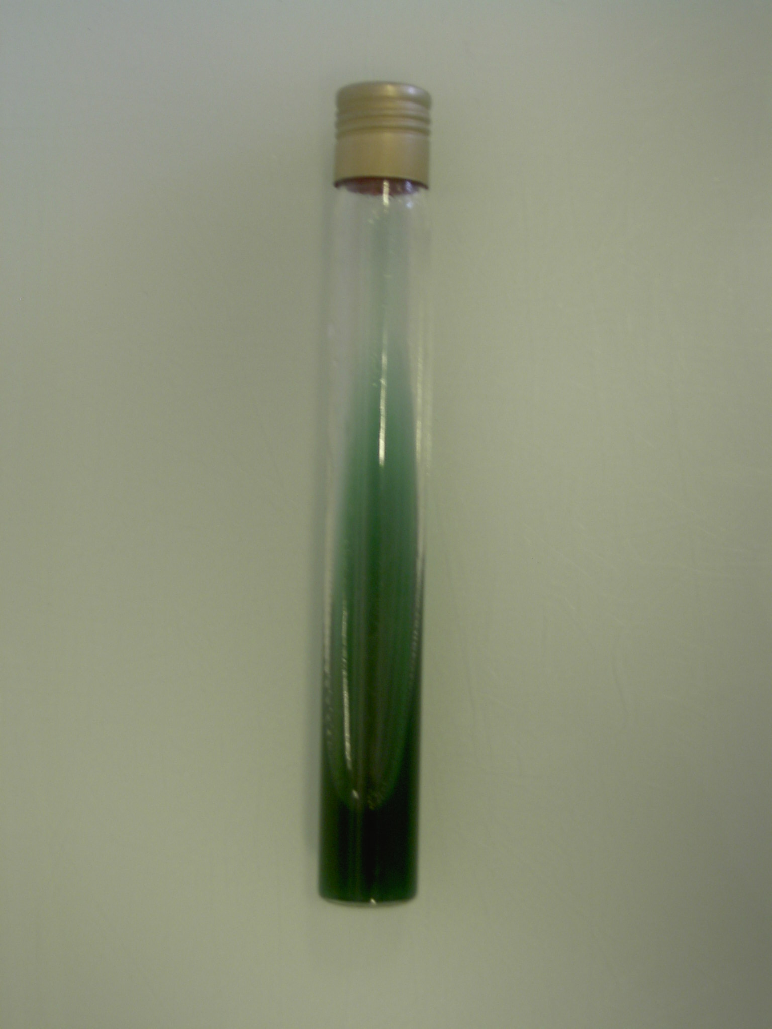 Milieu Citrate-Simmons en tube (culture microbiologique). Utilisation des citrates comme seule source de carbonne Photo prise par Raziel 4 juin 2006 à 16:45 (CEST)